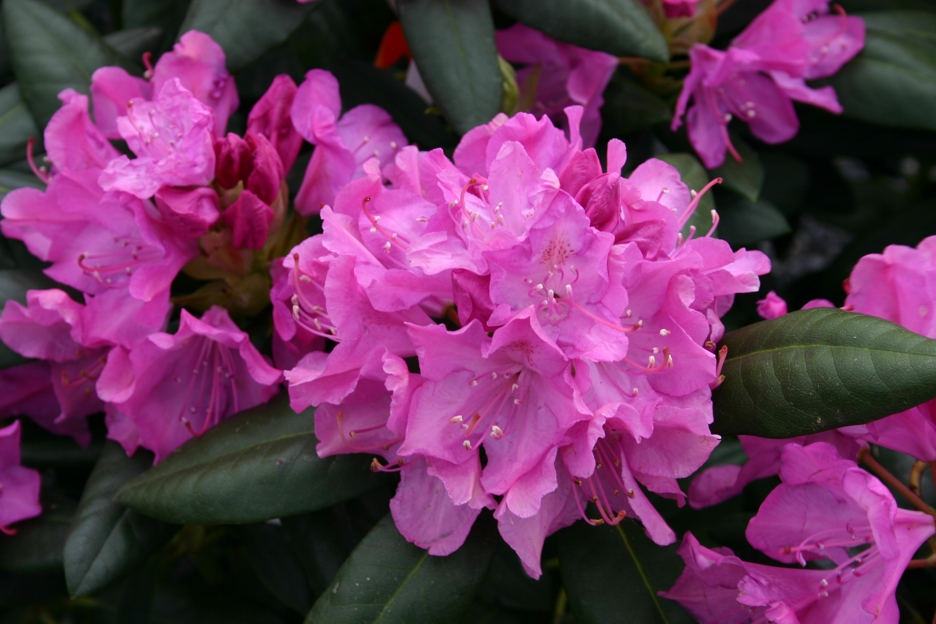 Rhododendron cv. 'Roseum elegans'